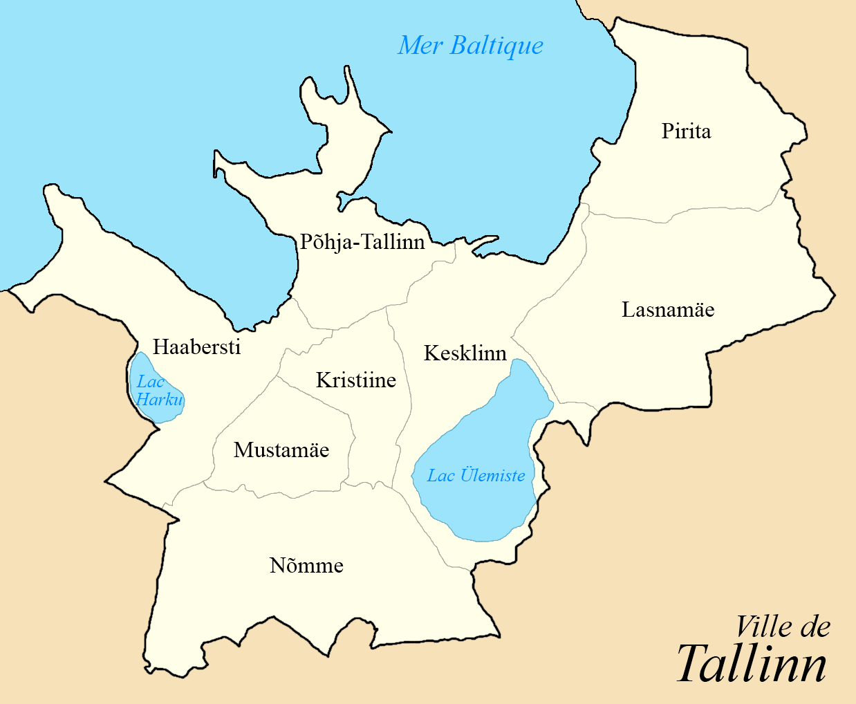 Quartiers de la ville de Tallinn